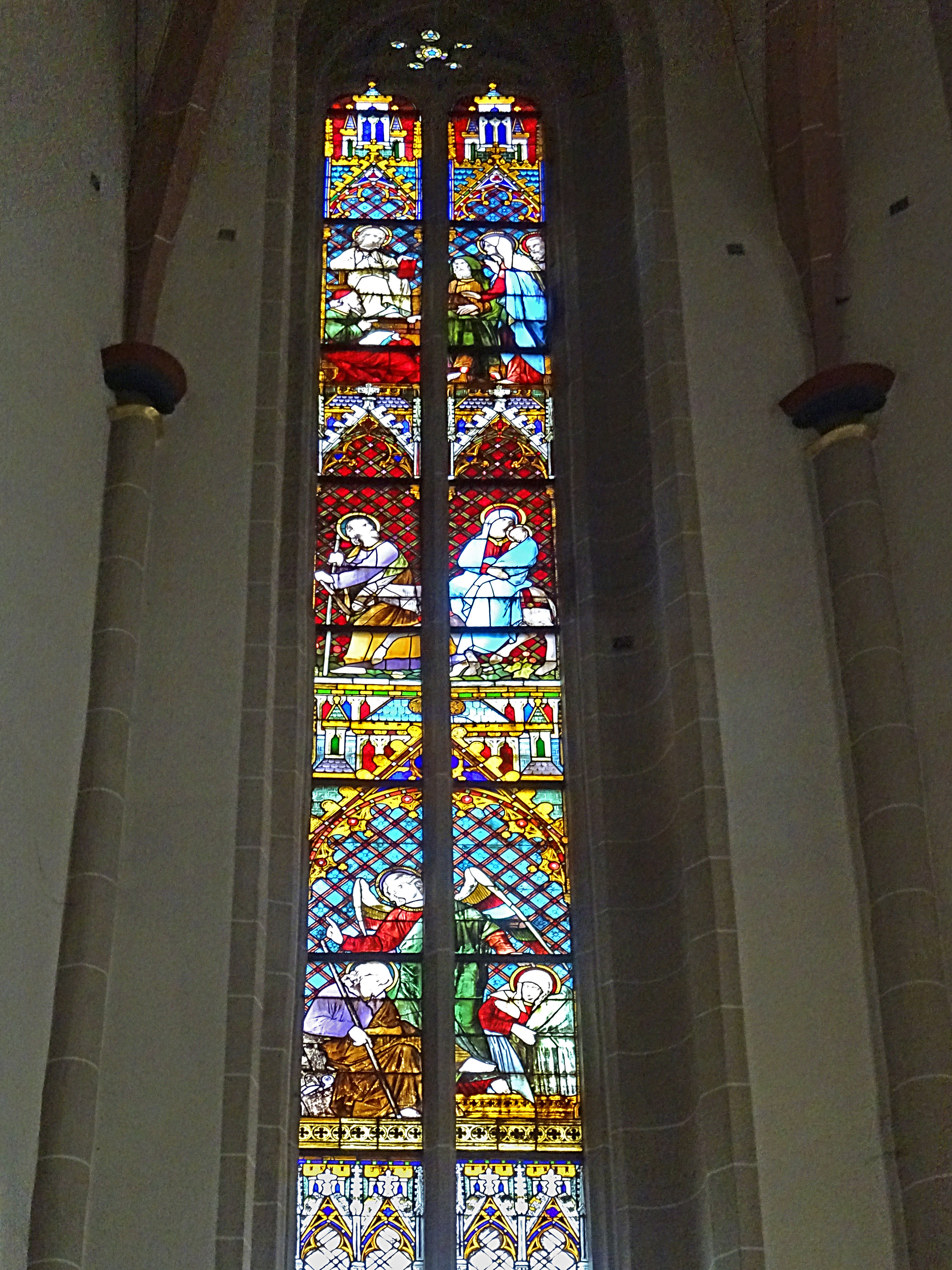 linkes Chorfenster (1884, Aufforderung zur Flucht / Flucht nach Ägypten / der 12 jährige im Tempel) in der Pfarrkirche St. Gertrud (Dingelstädt)